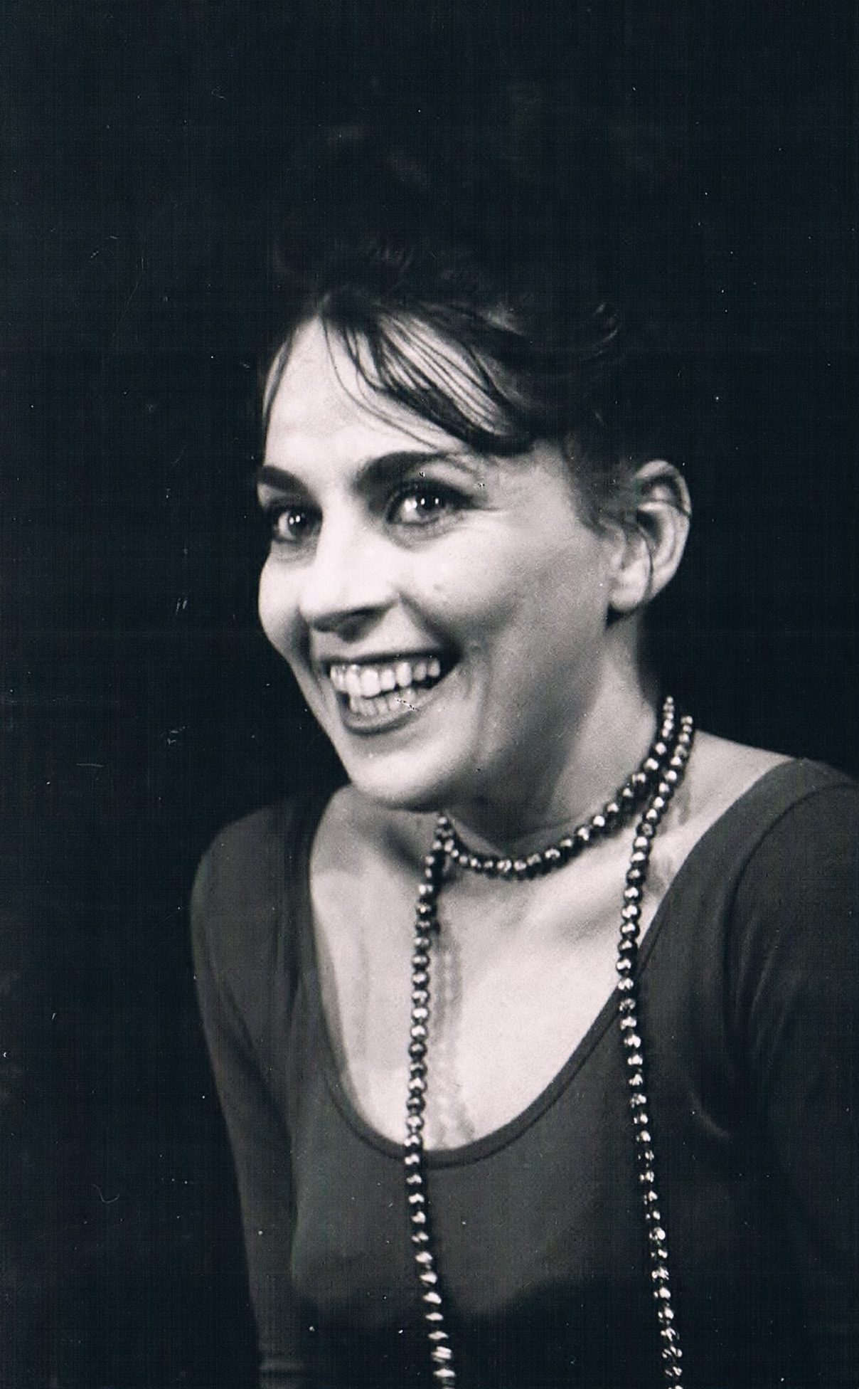 דינה דורון בתפקיד אירמה לה דוס, תיאטרון "הבימה" 1962